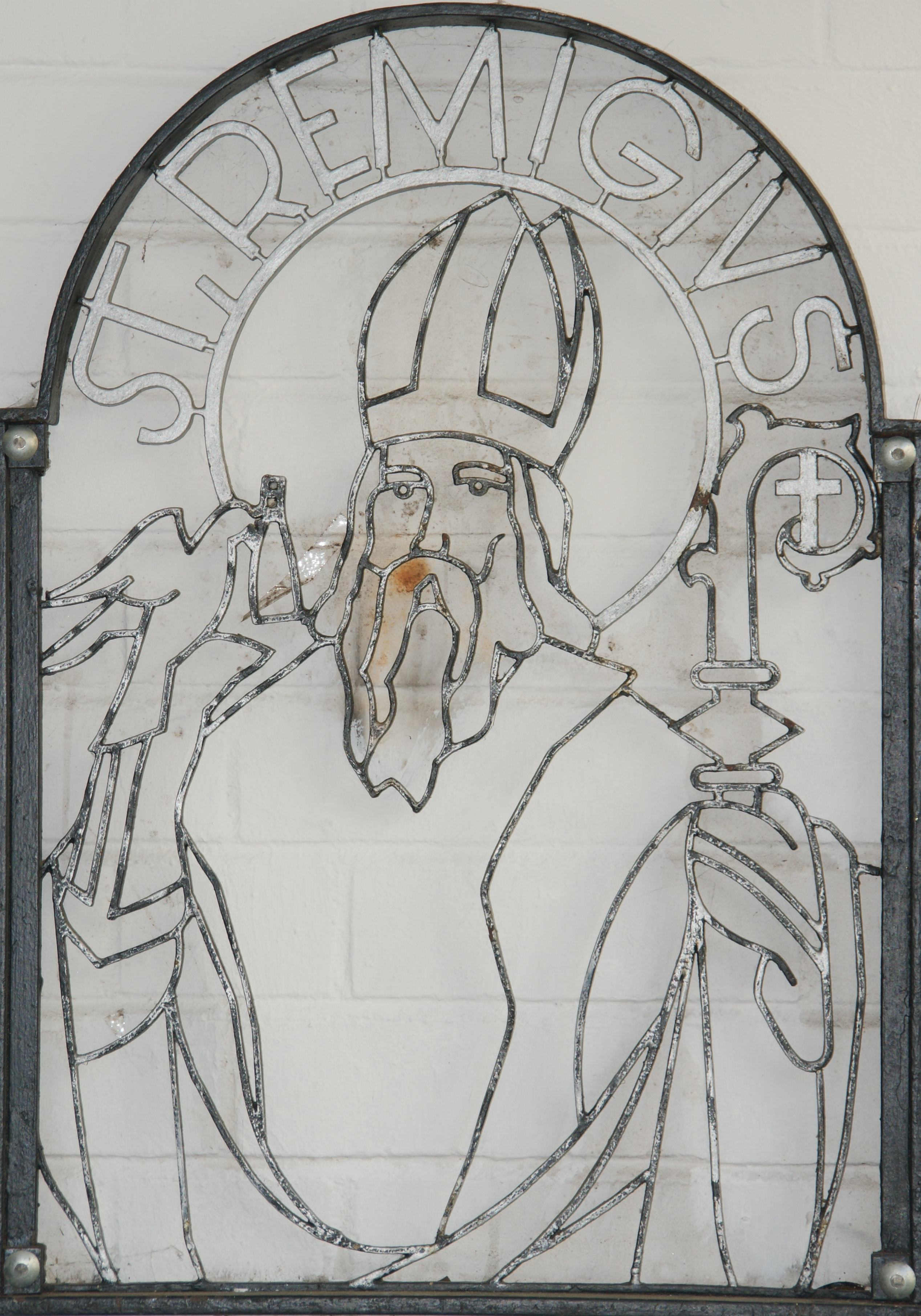 Remigiusdarstellung am Gemeindehaus St. Remigius, Königswinter